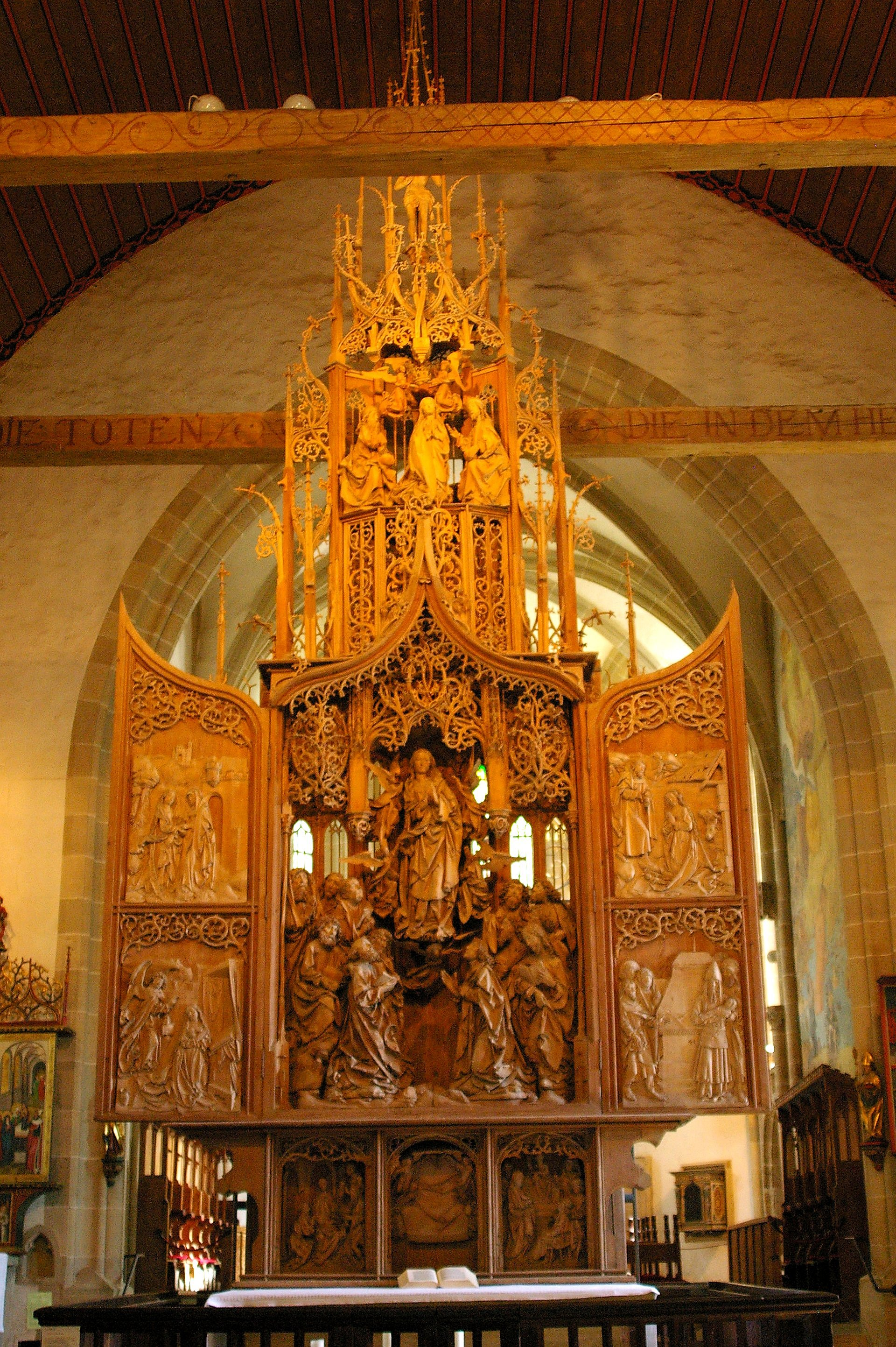 Creglingen - Riemenschneider-Altar